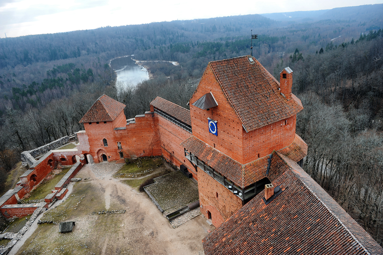 2014-03-04 Turaida Castle